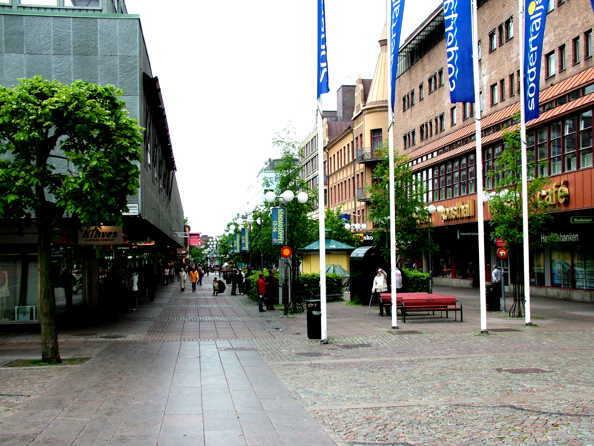 Original av Clemensfranz i GFDL Storgatan sett från Stortorget i centrala Södertälje i Sörmland. Förbättrad version av original från Clemensfranz i GFDL.